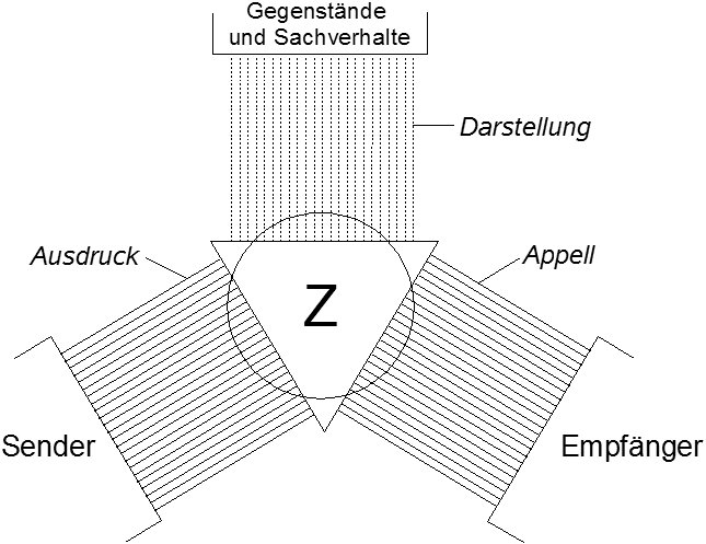 Das Organon-Modell nach Karl Bühler. Original erstellt von User:Hermy (corrected version).